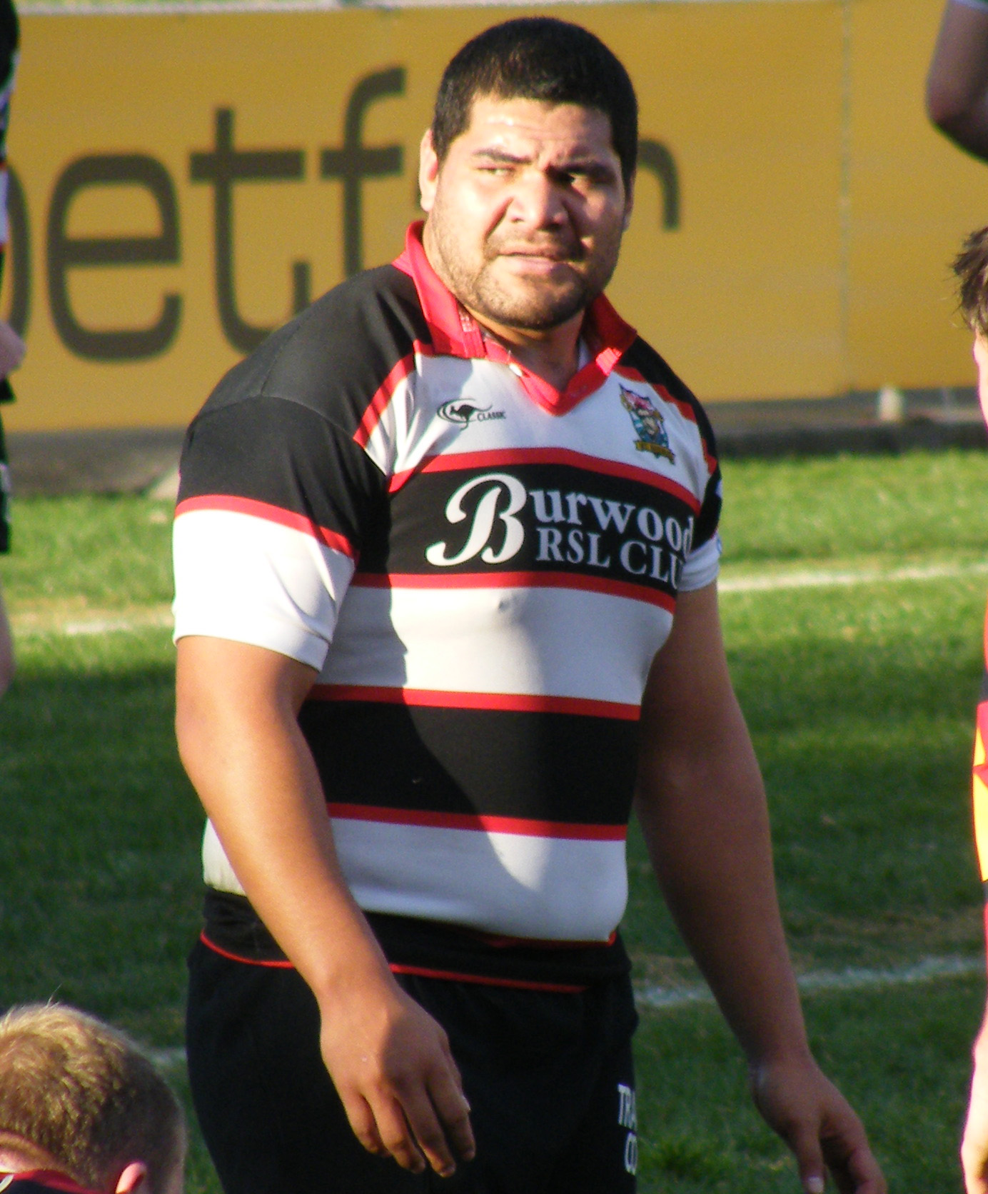 Rodney blake